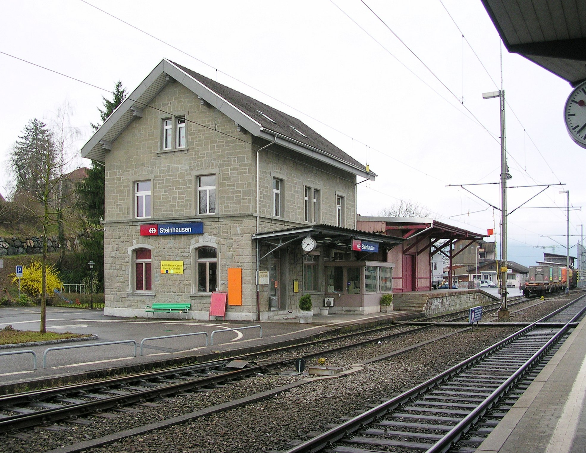 Bahnhof Steinhausen ZG, aufgenommen vom Bahnsteig der S9 aus